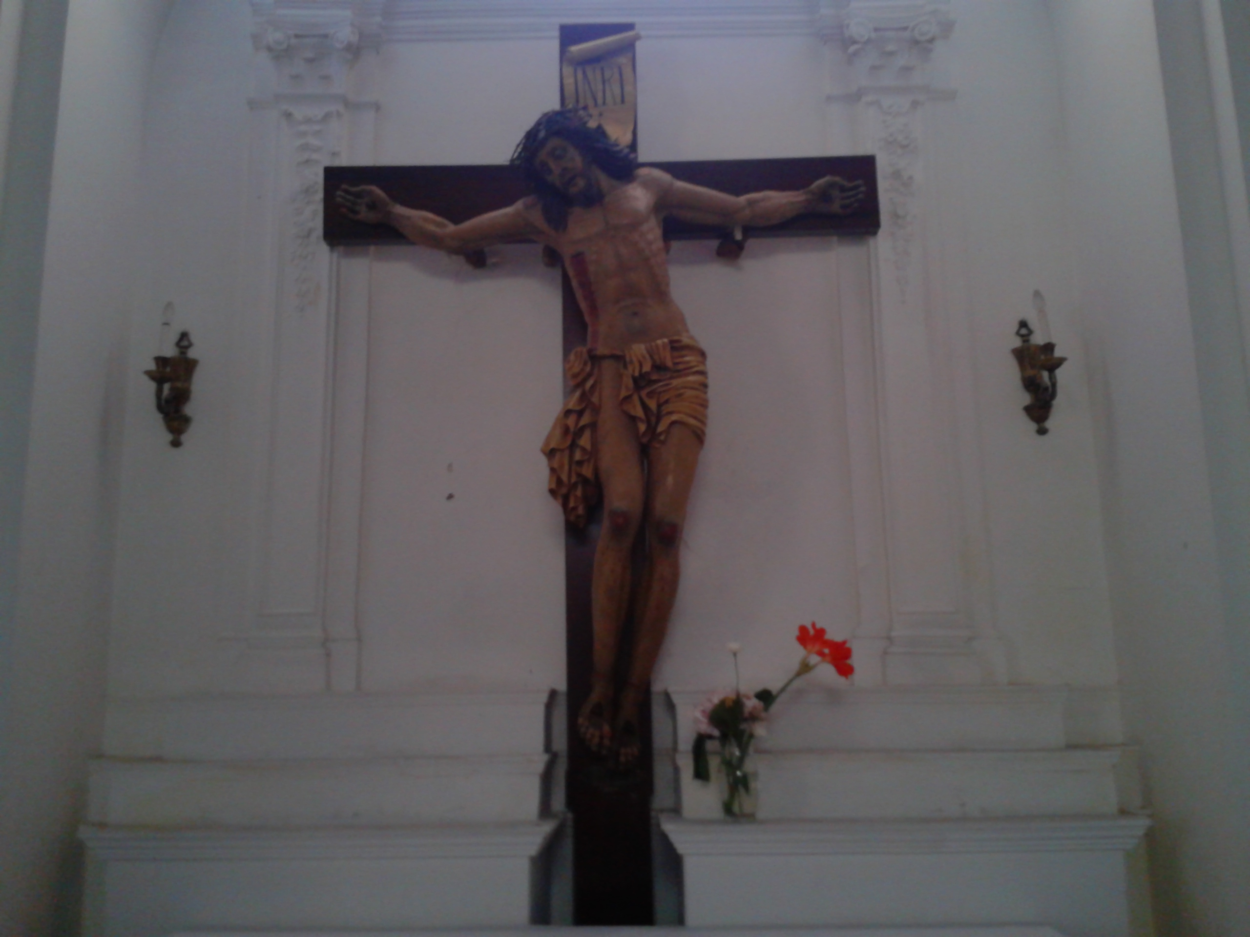 Nuovo Crocifisso ligneo dell'omonima chiesa a Palmi, usato per la processione del 3 maggio al posto del Crocifisso ligneo del XVII secolo.